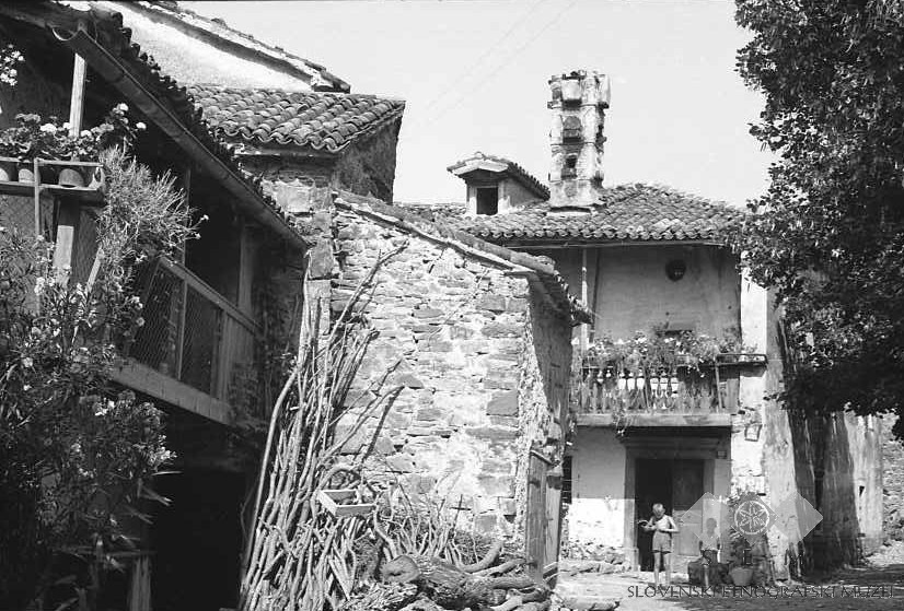 Hiša z ognjiščem pri Česnovih, Goče.